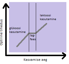 Glükoosi ja laktoosi esinemisel kasvukeskkonnas joonistub välja kasvukõver, millel on kaks eksponentsiaalset kasvufaasi ja nende vahel lag-faas. Esimese eksponentsiaalse kasvufaasi ajal kasutab bakter süsiniku- ja energiaallikana glükoosi, kuni selle otsalõppemiseni kasvukeskkonnast. Järgneb lag-faas. Teise eksponentsiaalse kasvufaasi ajal kasutab bakter süsiniku- ja energiaallikana laktoosi.